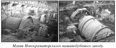 Млин.JPG: Млин Новокраматорського машинобудівного заводу